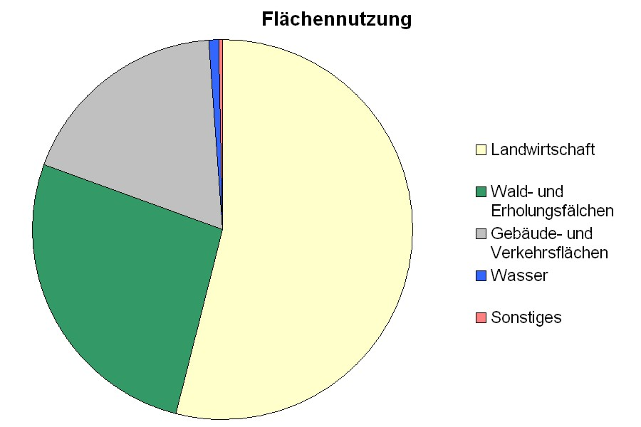 Flächennutzung Stadt Euskirchen